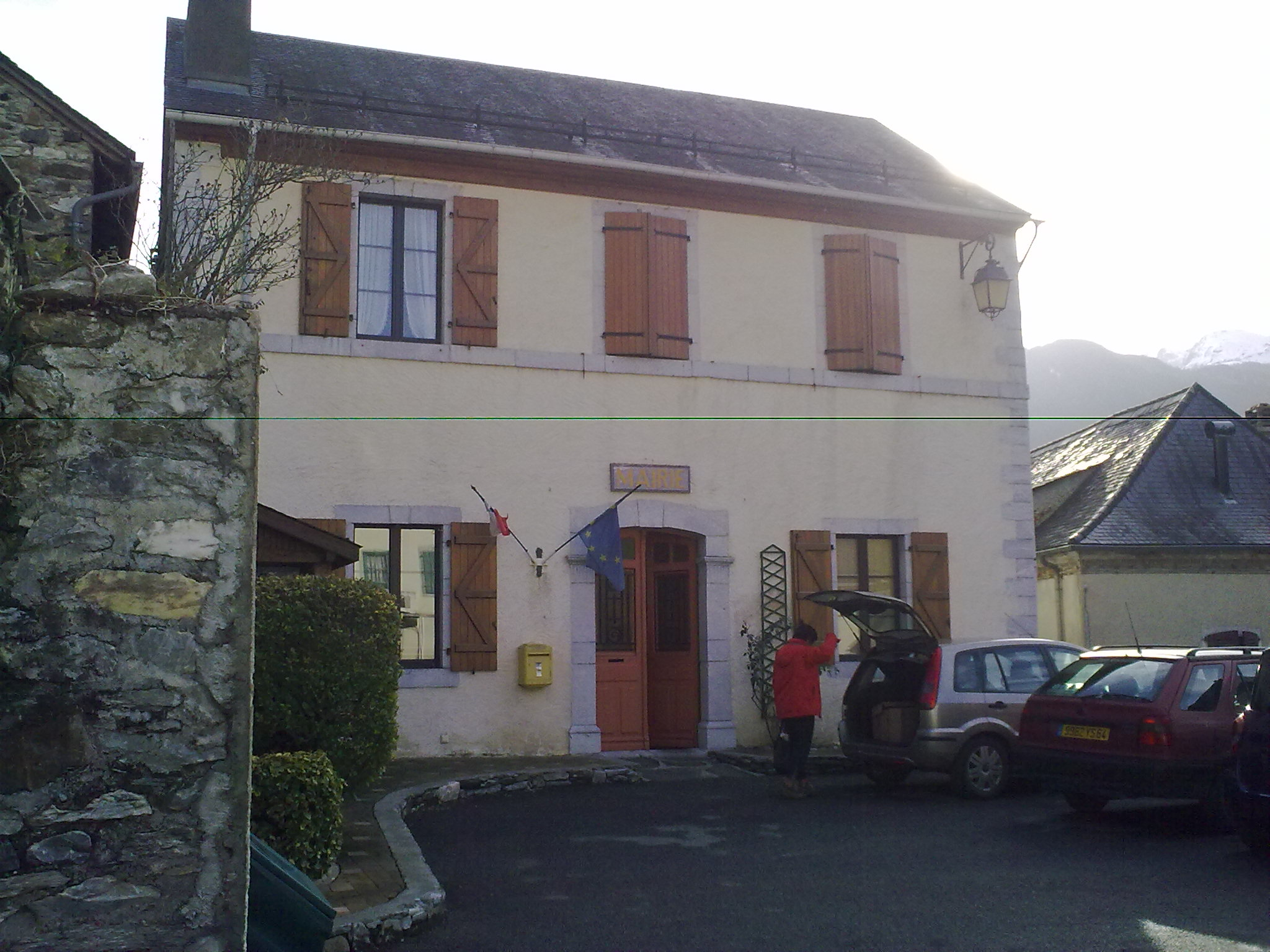 Mairie de Louvie-Soubiron